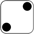 European die face 2